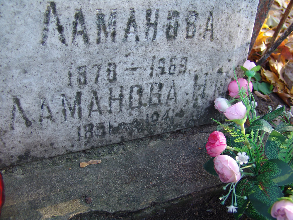 Состояние захоронения Надежды Петровны Ламановой на Ваганьковском кладбище в Москве на 7 ноября 2015 года.